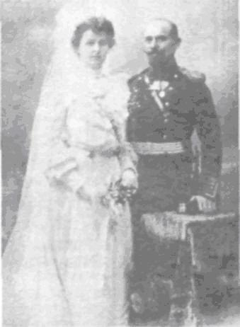 Юрдан Стоянов и Райна Каназирева в деня на сватбата им